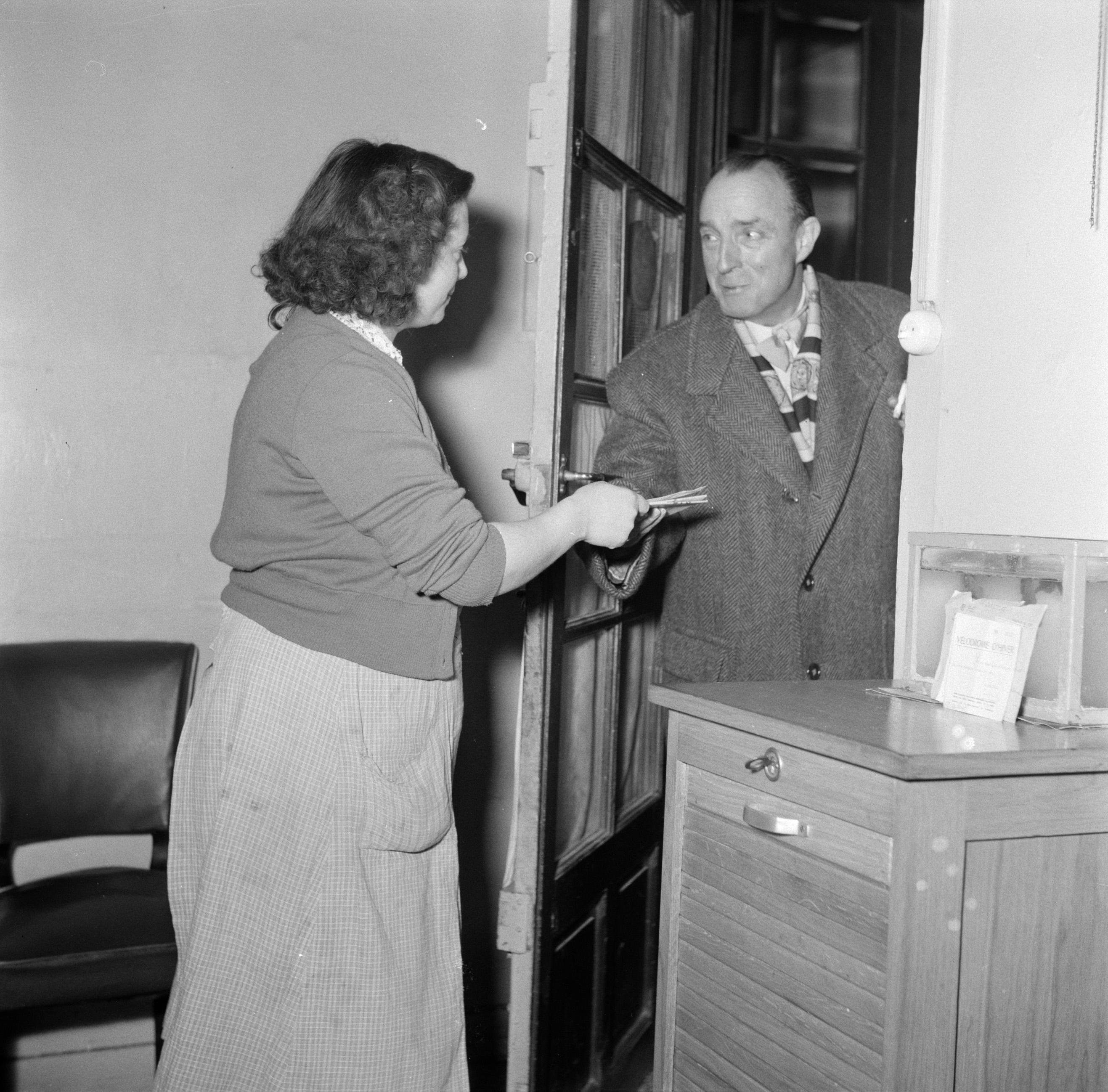 Collectie / Archief : Fotocollectie Van de Poll Reportage / Serie : De dagelijkse werkzaamheden van een conciërge in een Parijs' appartementengebouw Beschrijving : De conciërge overhandigt de post Datum : 1954 Locatie : Frankrijk, Parijs Trefwoorden : deuren, post Fotograaf : Poll, Willem van de Auteursrechthebbende : Nationaal Archief Materiaalsoort : Negatief (zwart/wit) Nummer archiefinventaris : bekijk toegang 2.24.14.02 Bestanddeelnummer : 252-9312